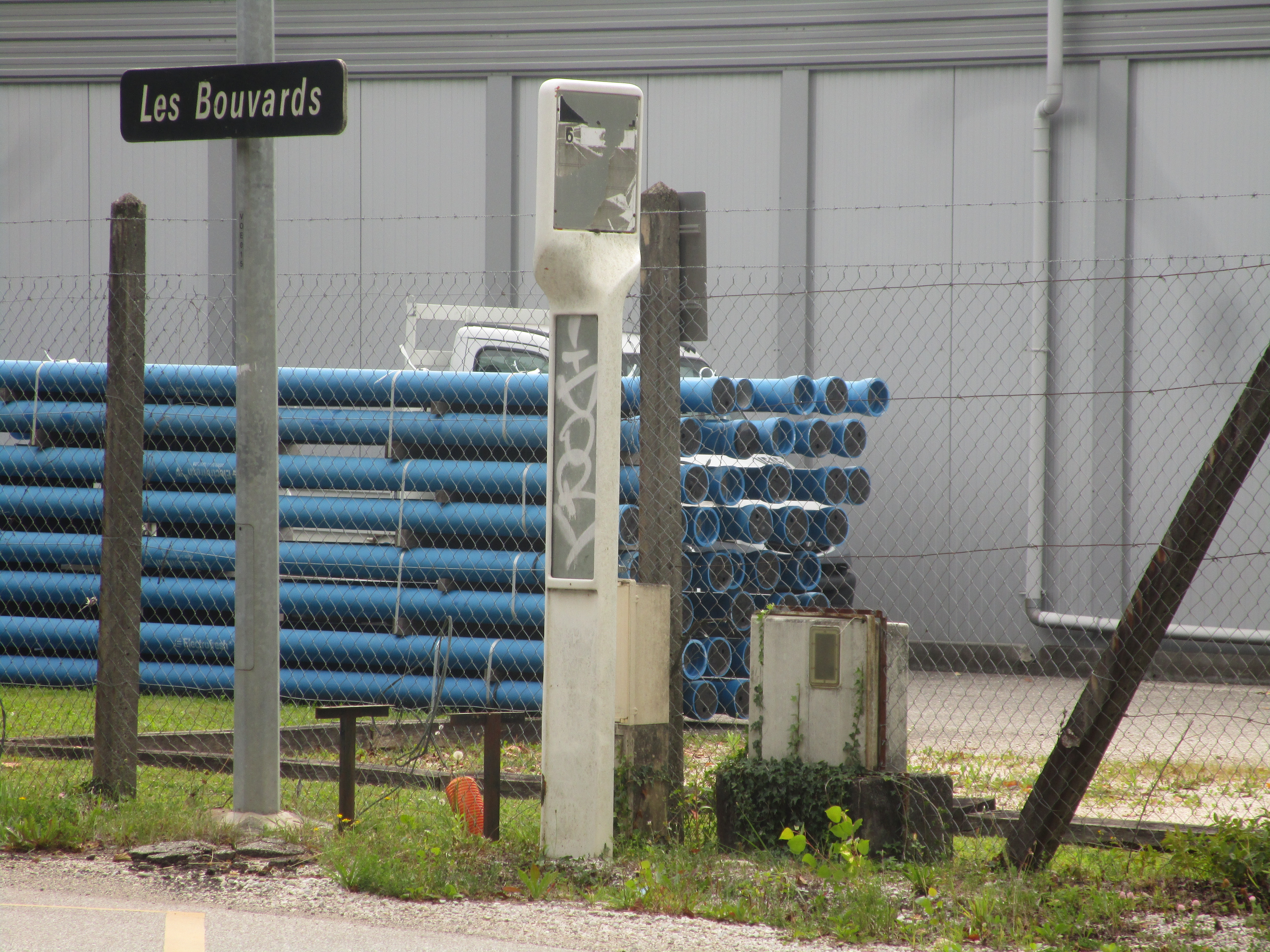 A former bus stop in Voglans on August 27, 2017.